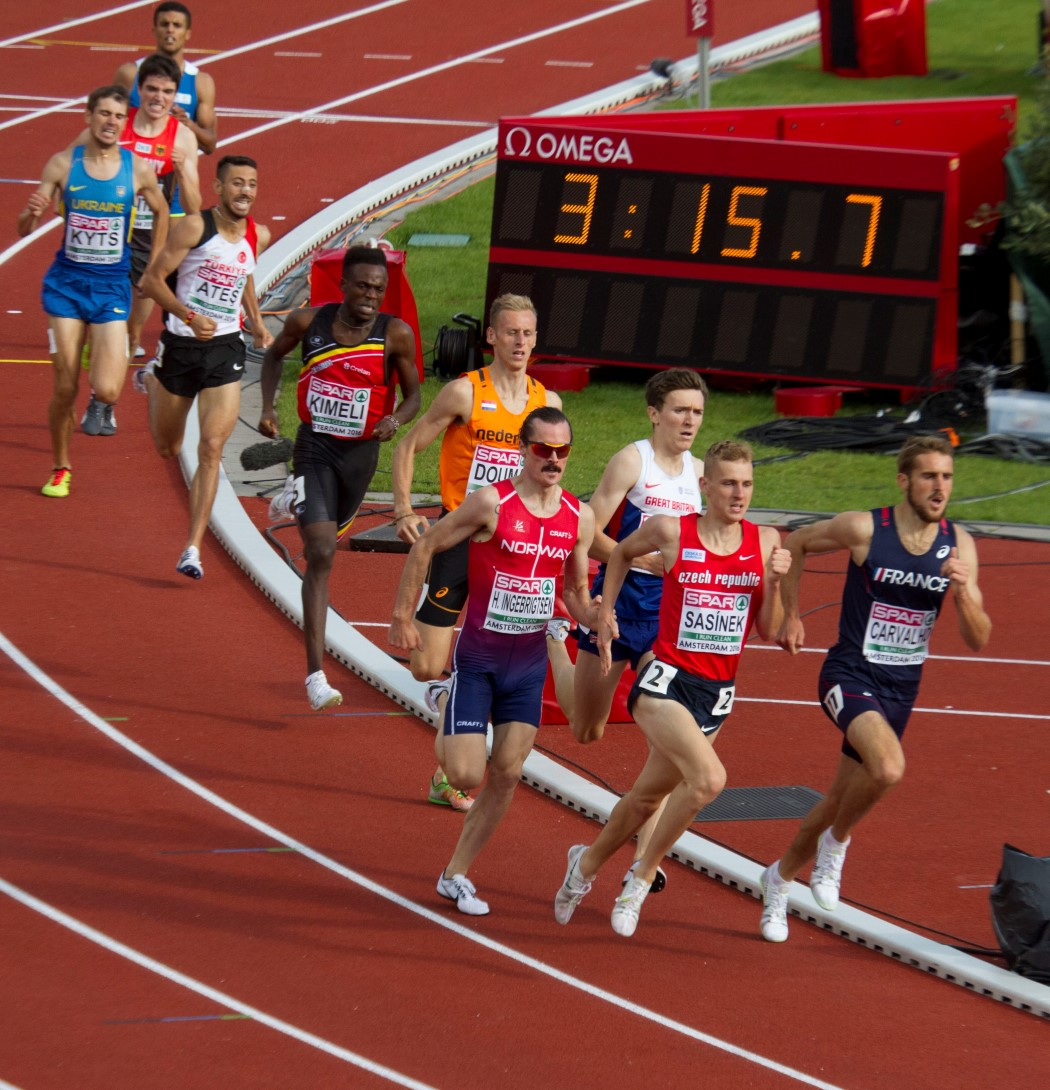 0685 1500m reeksen kimeli